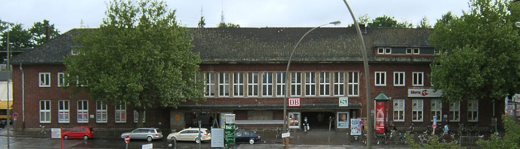 Bildbeschreibung: Hamburg, Bergedorf, Bahnhof (abgerissen im Juli 2008) Fotograf: selbst Datum: 25.5.2006